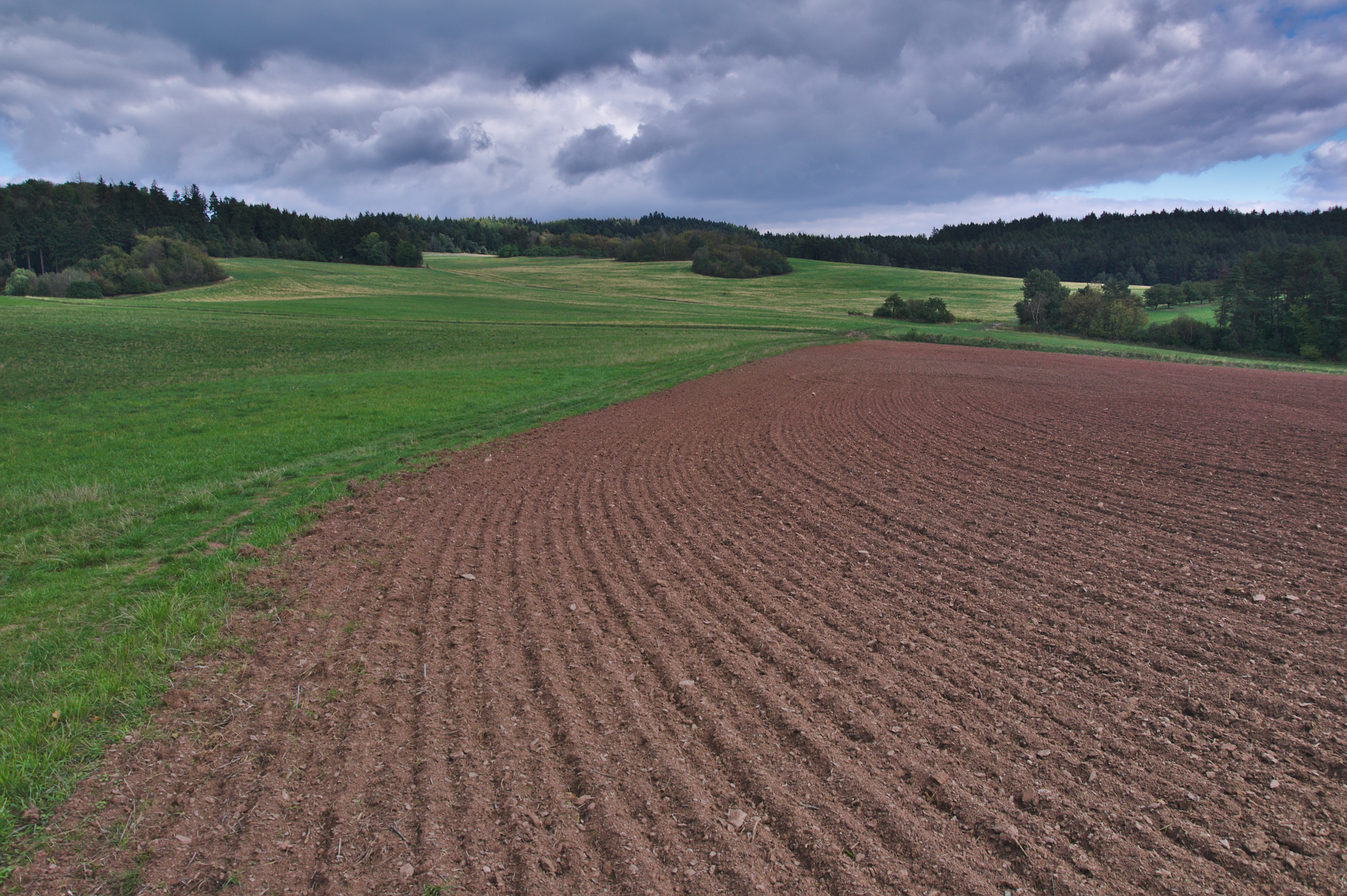 Krajina v okolí obce Strhaře, okres Brno-venkov